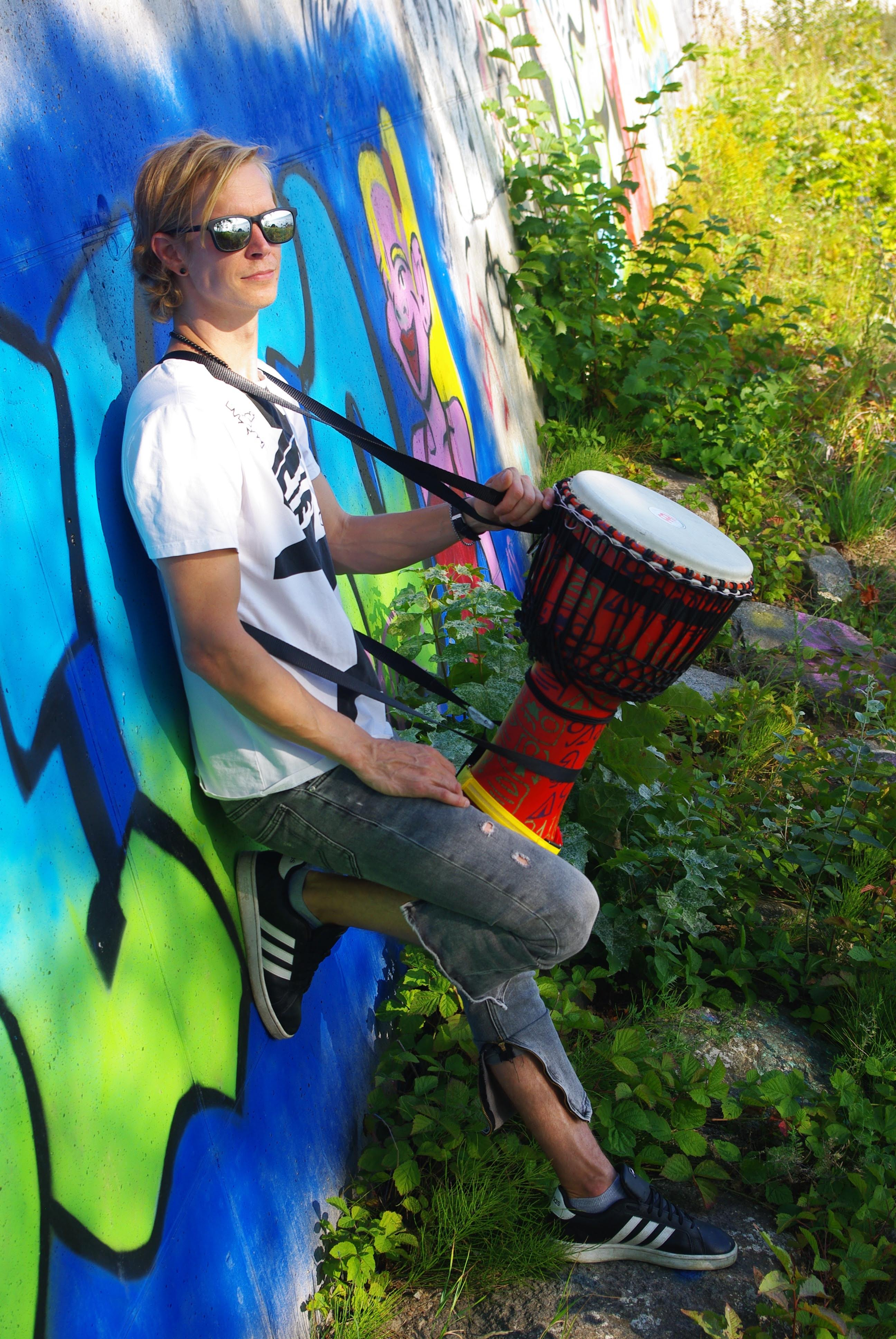 Silver Ulvik djembe trummiga